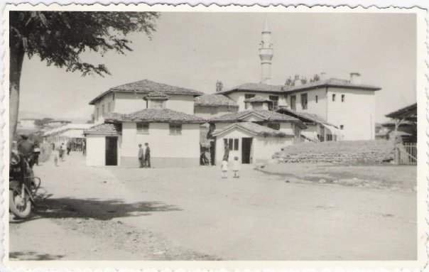 Hamamözü, Amasya